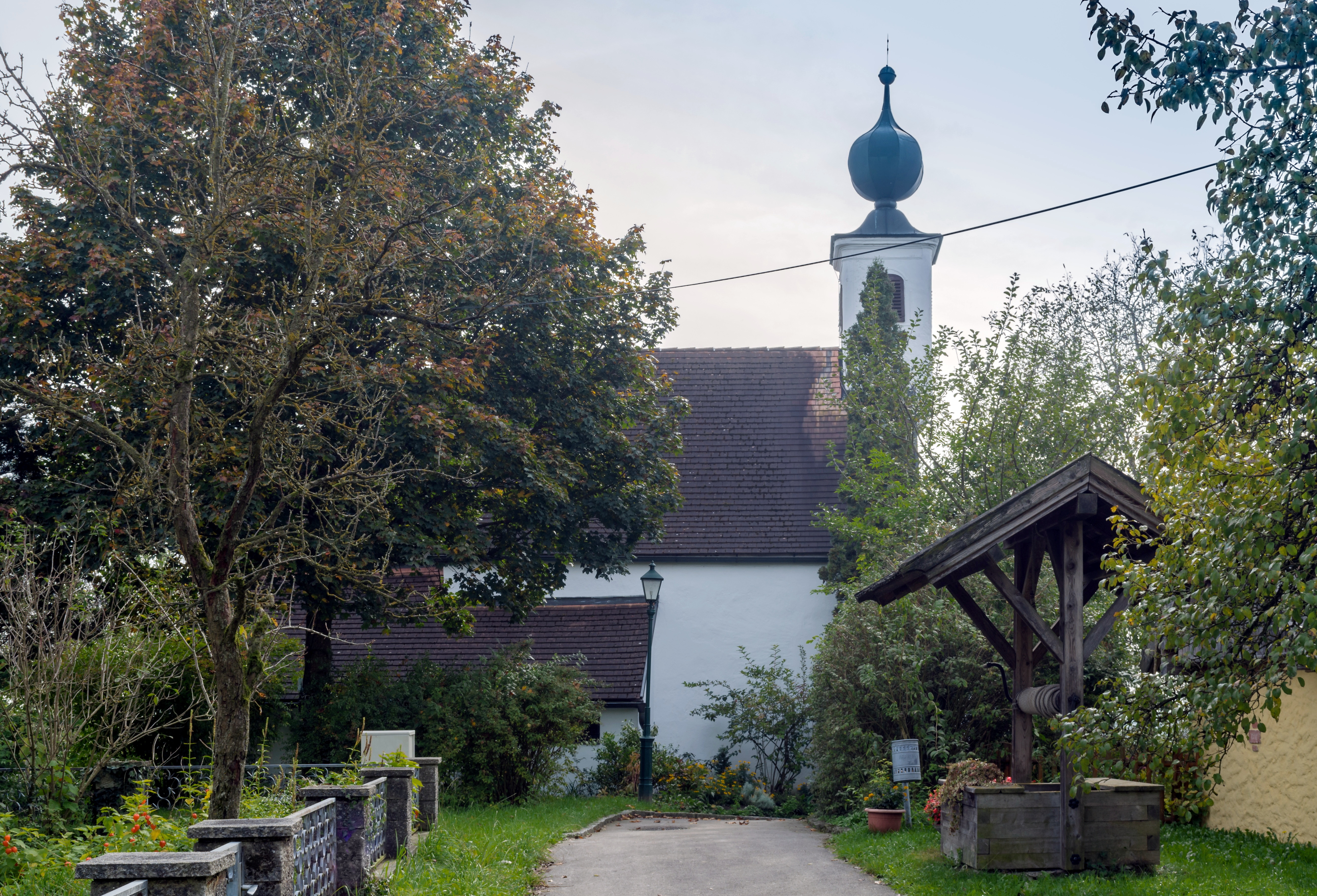 Die Kalvarienbergkirche St. Philippi und Jakobi wurde um 1488 erbaut und am Anfang des 18. Jahrhunderts barockisiert. Sie hat ein gotisches einschiffiges Langhaus mit zwei Jochen und Kreuzrippengewölben. Der barocke einjochige Chor mit quadratischem Grundriss ist gegenüber dem Langhaus etwas eingezogen. Der gemauerte Dachreiter trägt einen Zwiebelhelm.